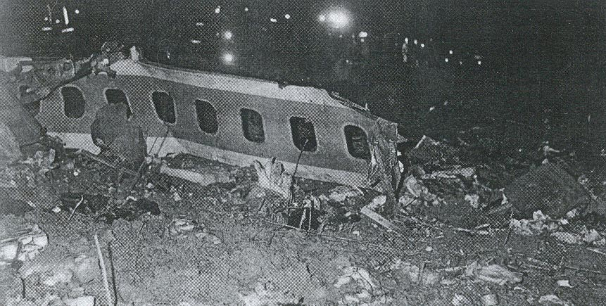 Последствия авиакатастрофы в Элктоне 2 декабря 1963 года